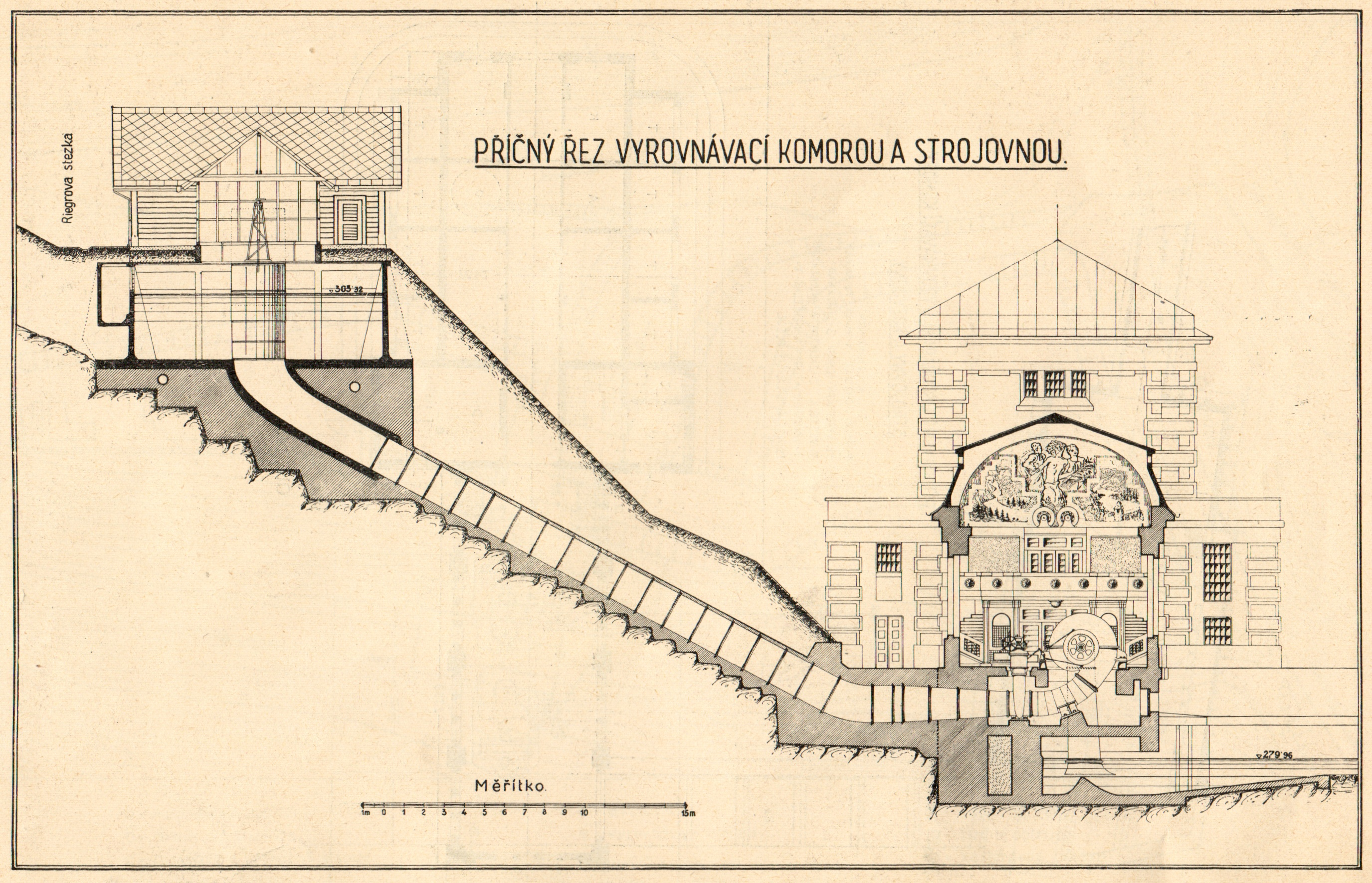 Hydrocentrála na Jizeře pod Spálovem, příčný řez vyrovnávací komorou a strojovnou.